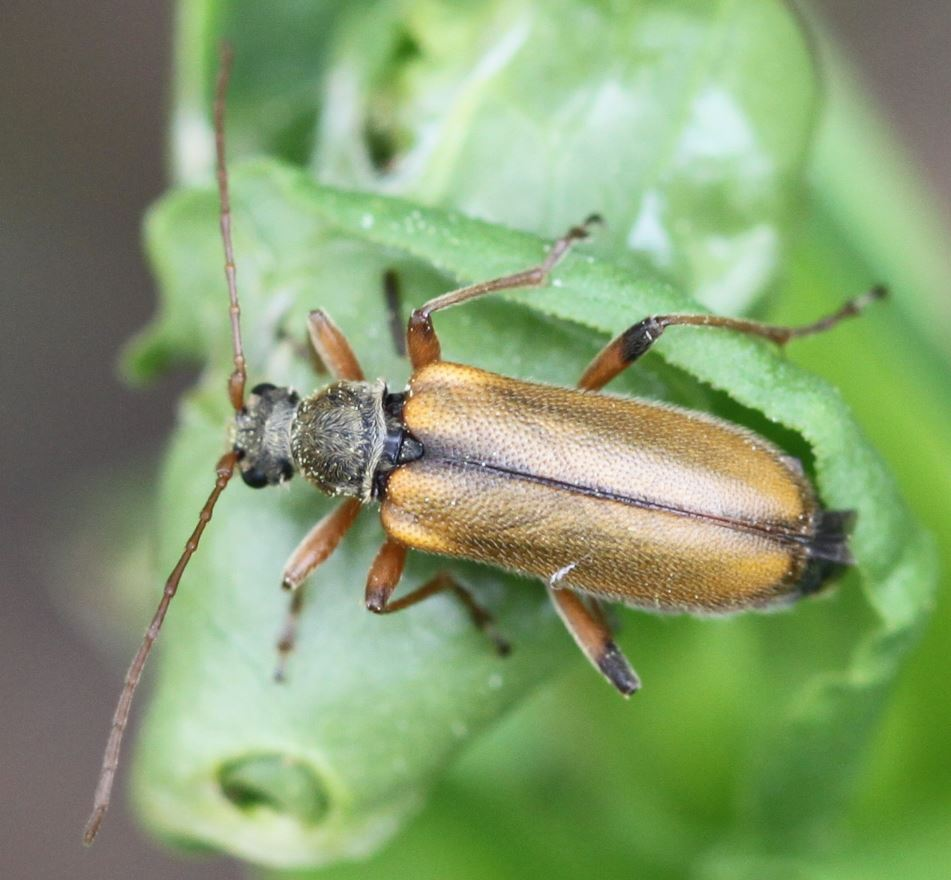 Helle Form von Cortodera humeralis am 13. Mai 2017 in der Schwetzinger Hardt